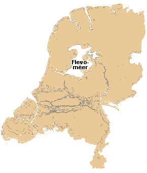 La région des Pays-Bas vers l'an 1000